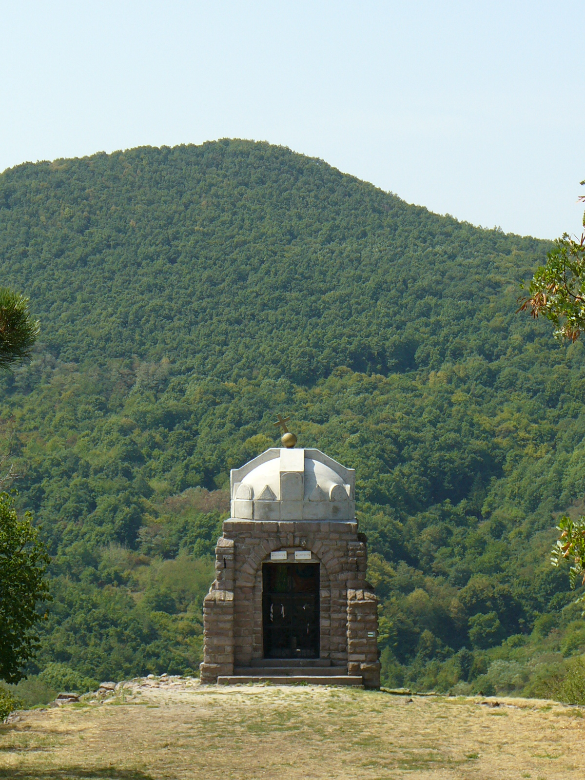 Magyar Kálvária kapu, 14 stáció, Országzászló és Szent István kápolna épületegyüttese. ID 3153 1936 október 4-én avatták fel. - Sátoraljaújhely, Szárhegy oldalában és tetején